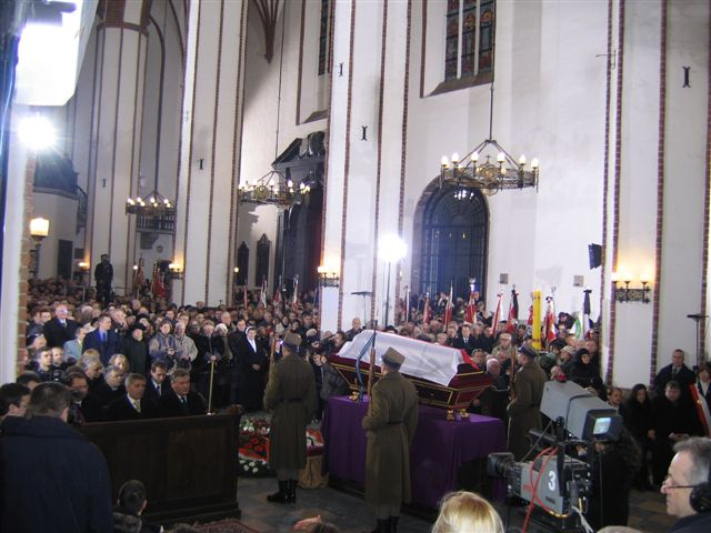 Jan Nowak-Jeziorański's funeral